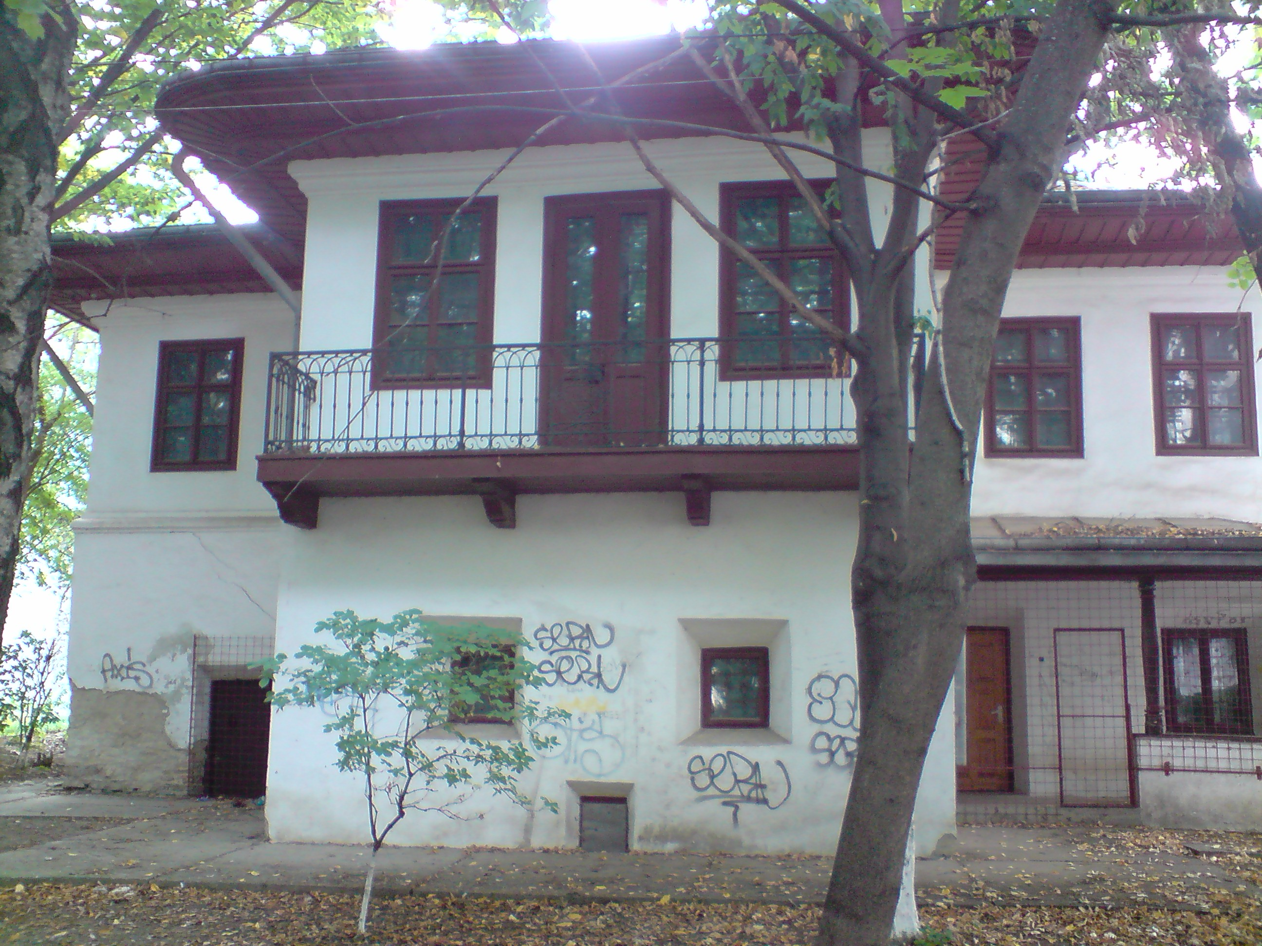 Casa Manolache Iorga - Muzeul Etnografic